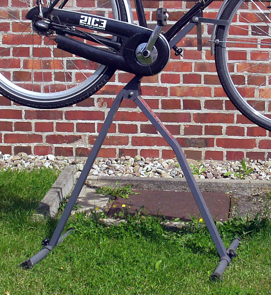 Montagestaender